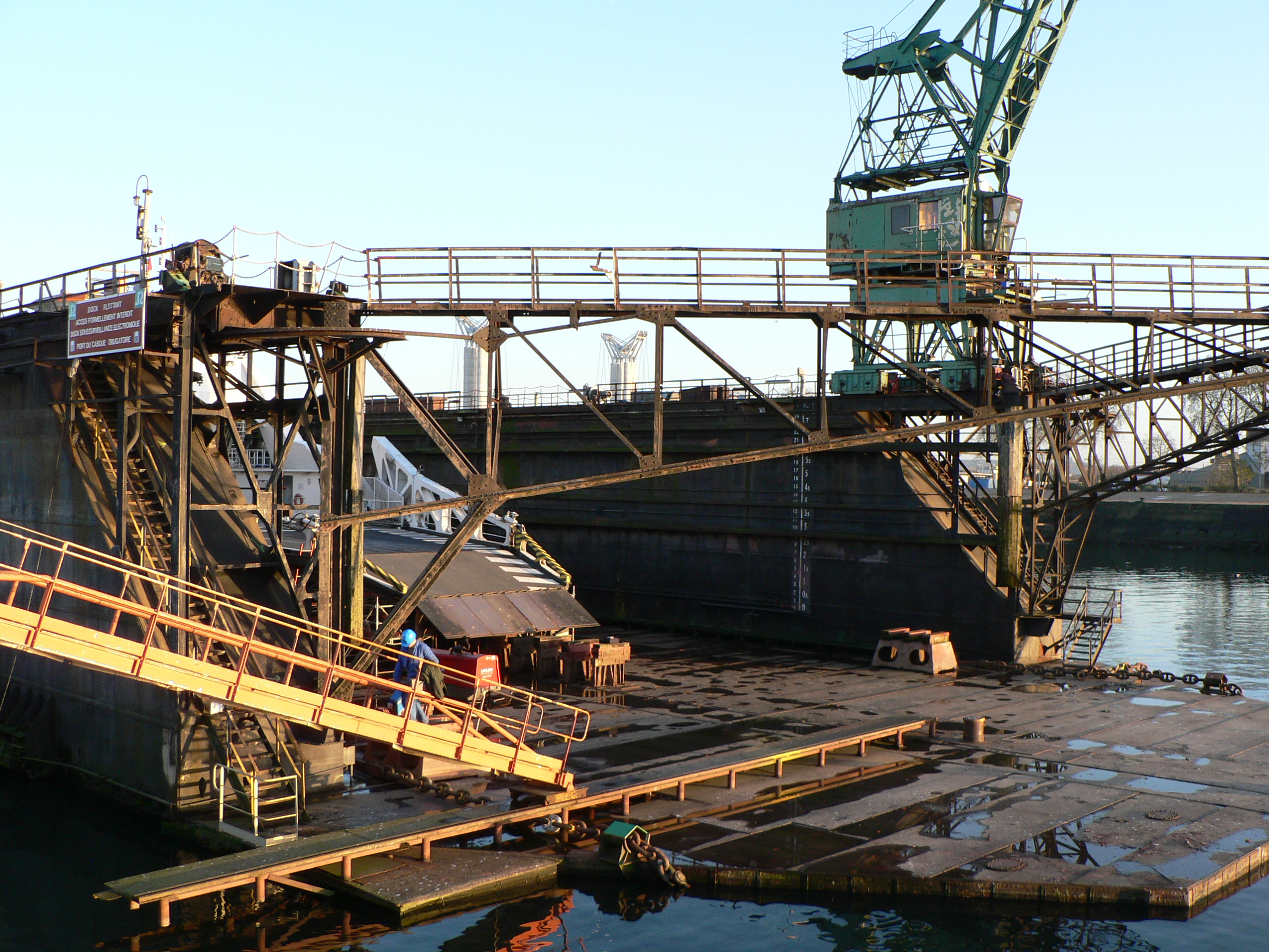 Dock flottant de RouenPhoto prise le 29 novembre 2006Auteur :Marc LigerCopyright : image sous GFDL